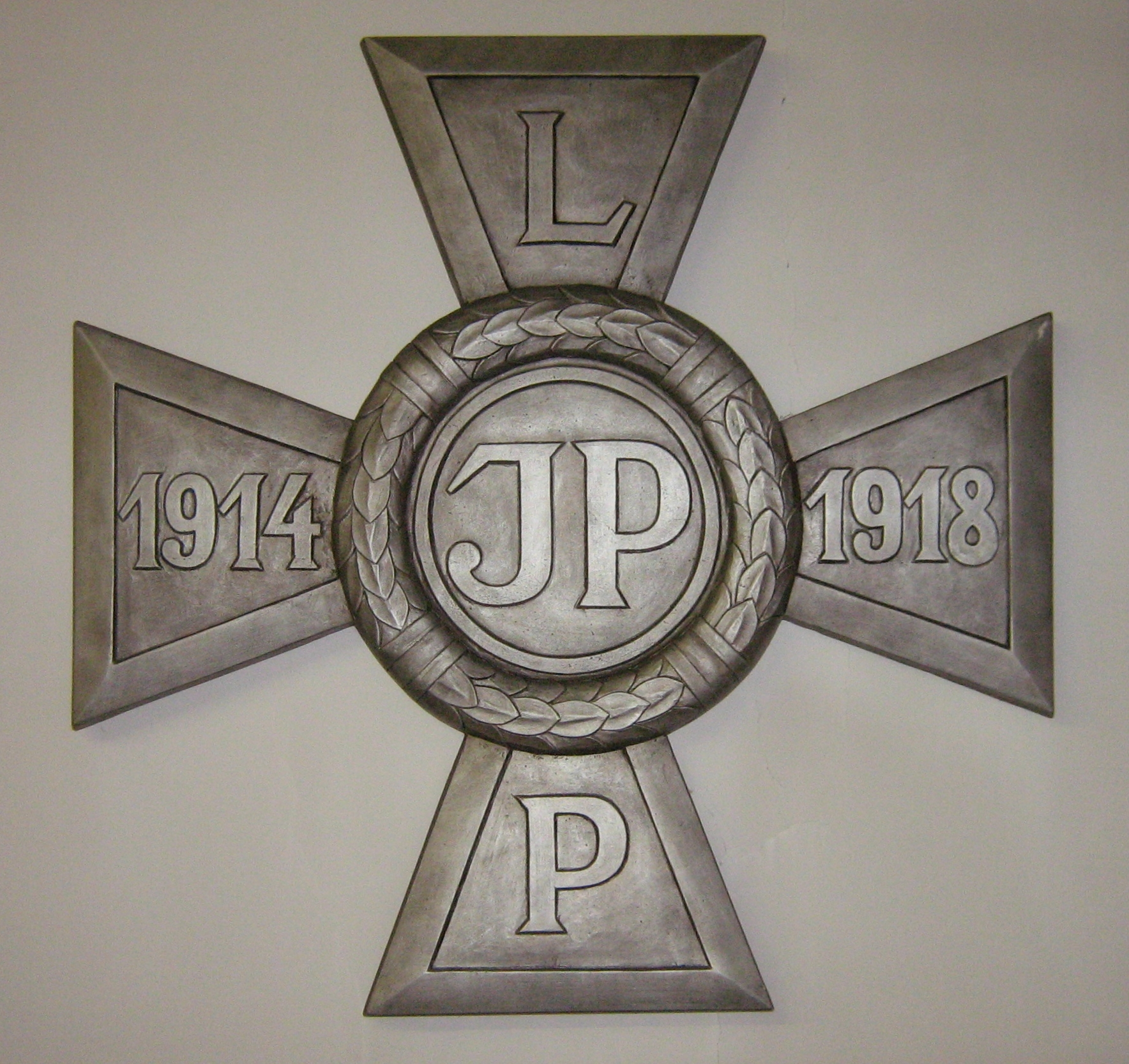 Krzyż Legionowy, odznaka organizacyjna Związku Legionistów Polskich. fot.Tomasz K. Żurawski